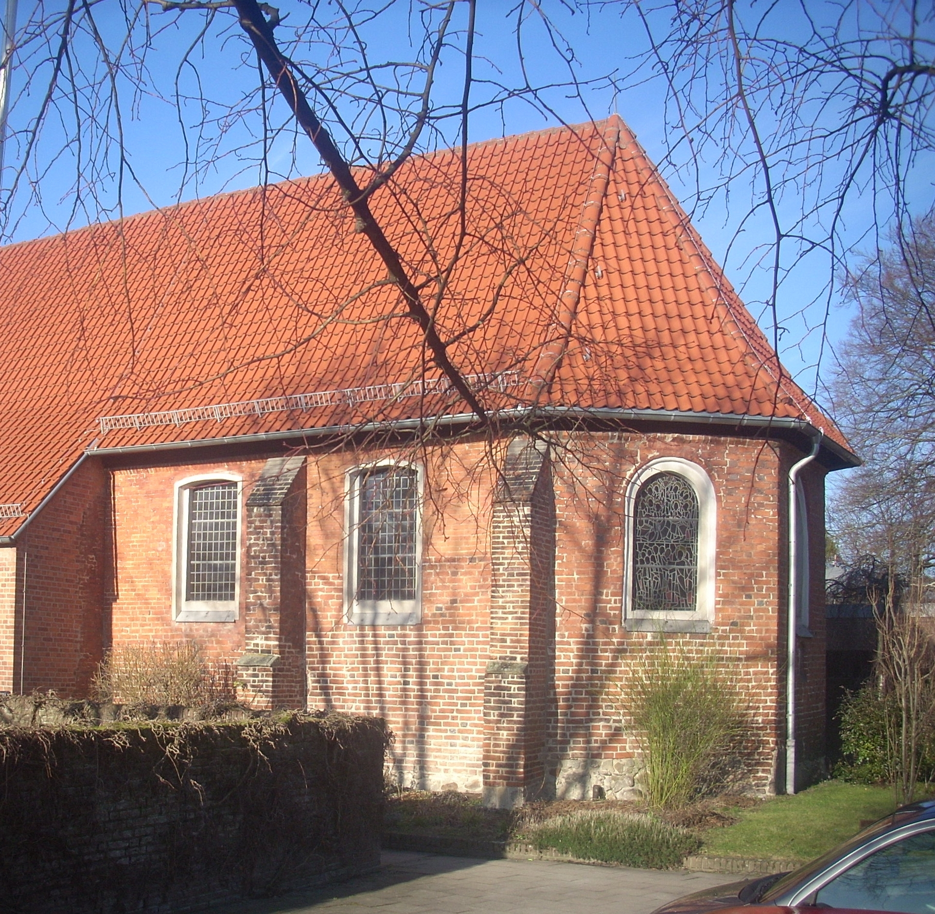 Hannover-Anderten, evang. St.-Martins-Kirche, Chor